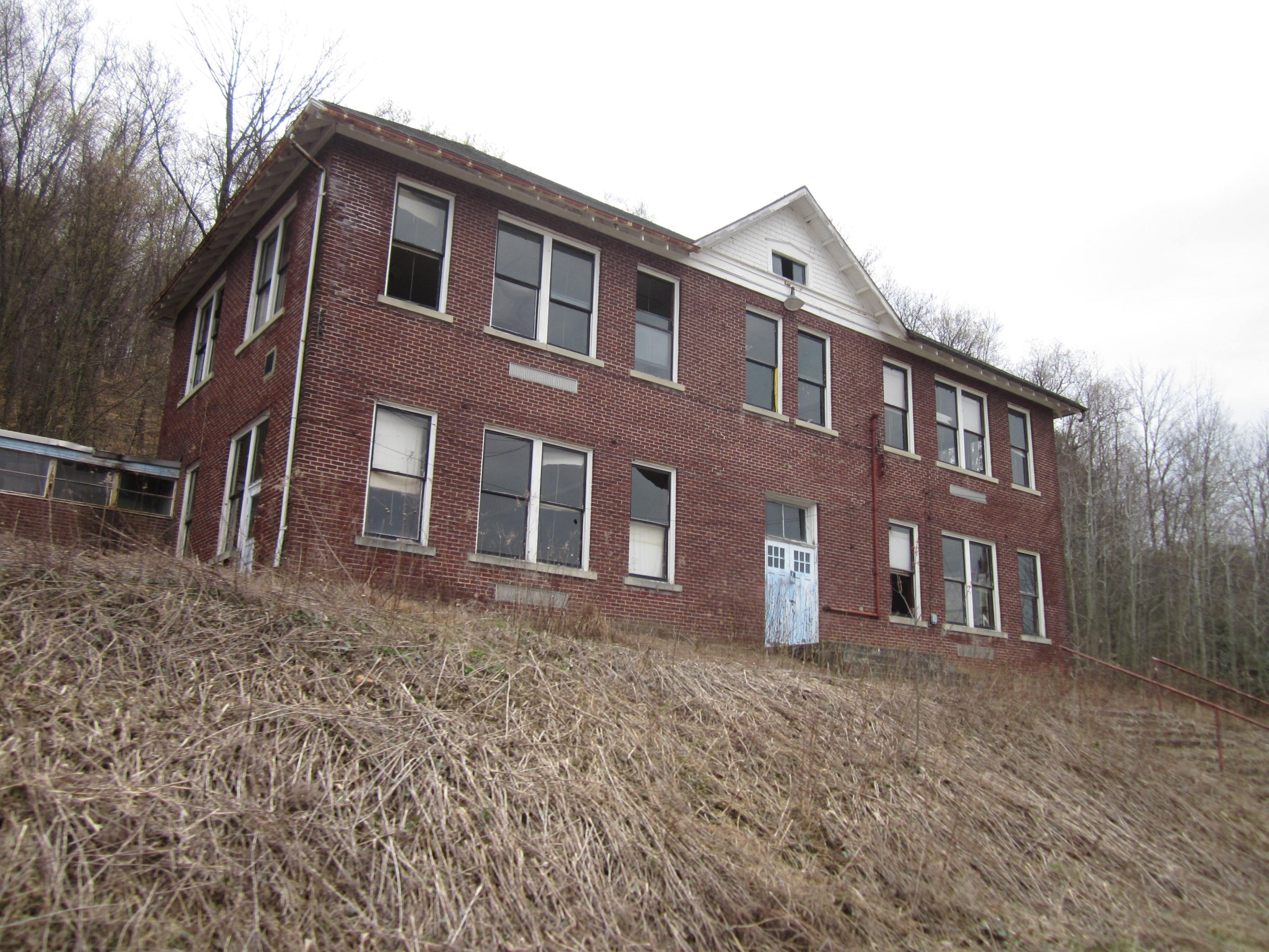 Hazel Hurst, Pennsylvania